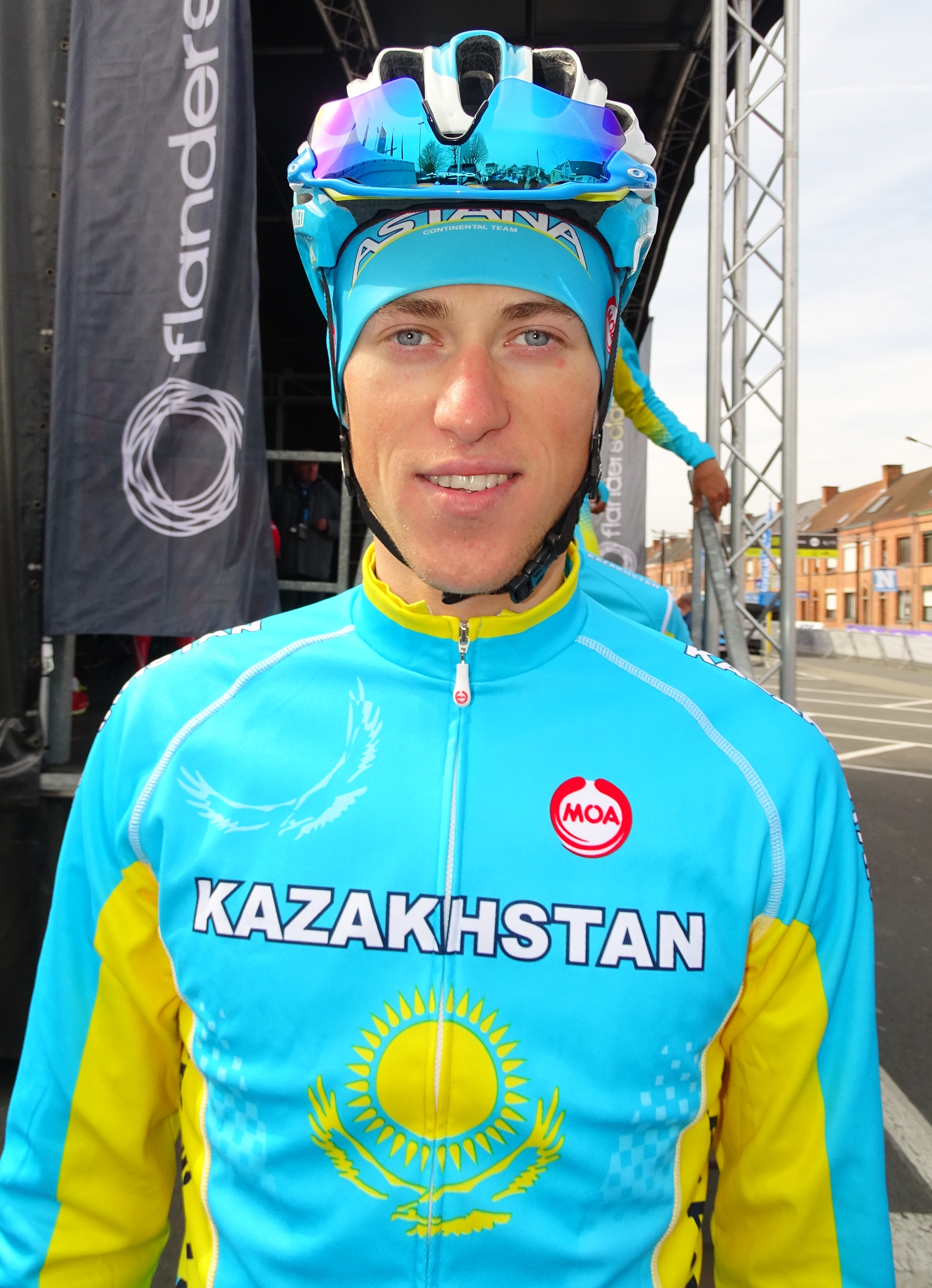 Reportage réalisé le samedi 9 avril à l'occasion du départ et de l'arrivée du Tour des Flandres espoirs 2016 à Audenarde, Belgique.